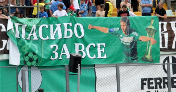 Василь Сачко